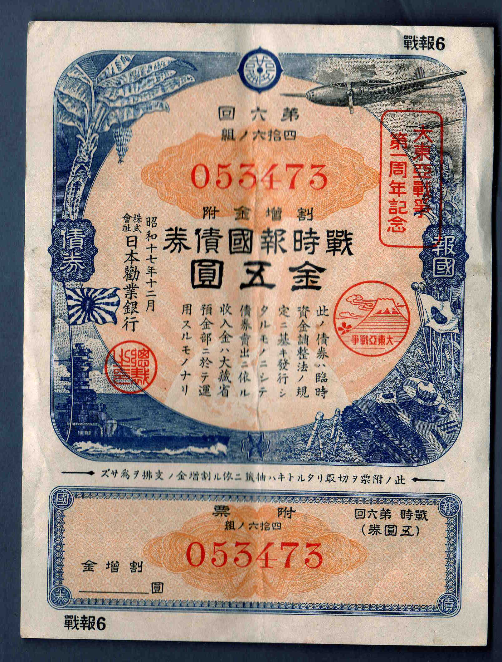 昭和17年に「大東亜戦争第二周年記念」として日本勧業銀行が販売した「戦時報国債権」